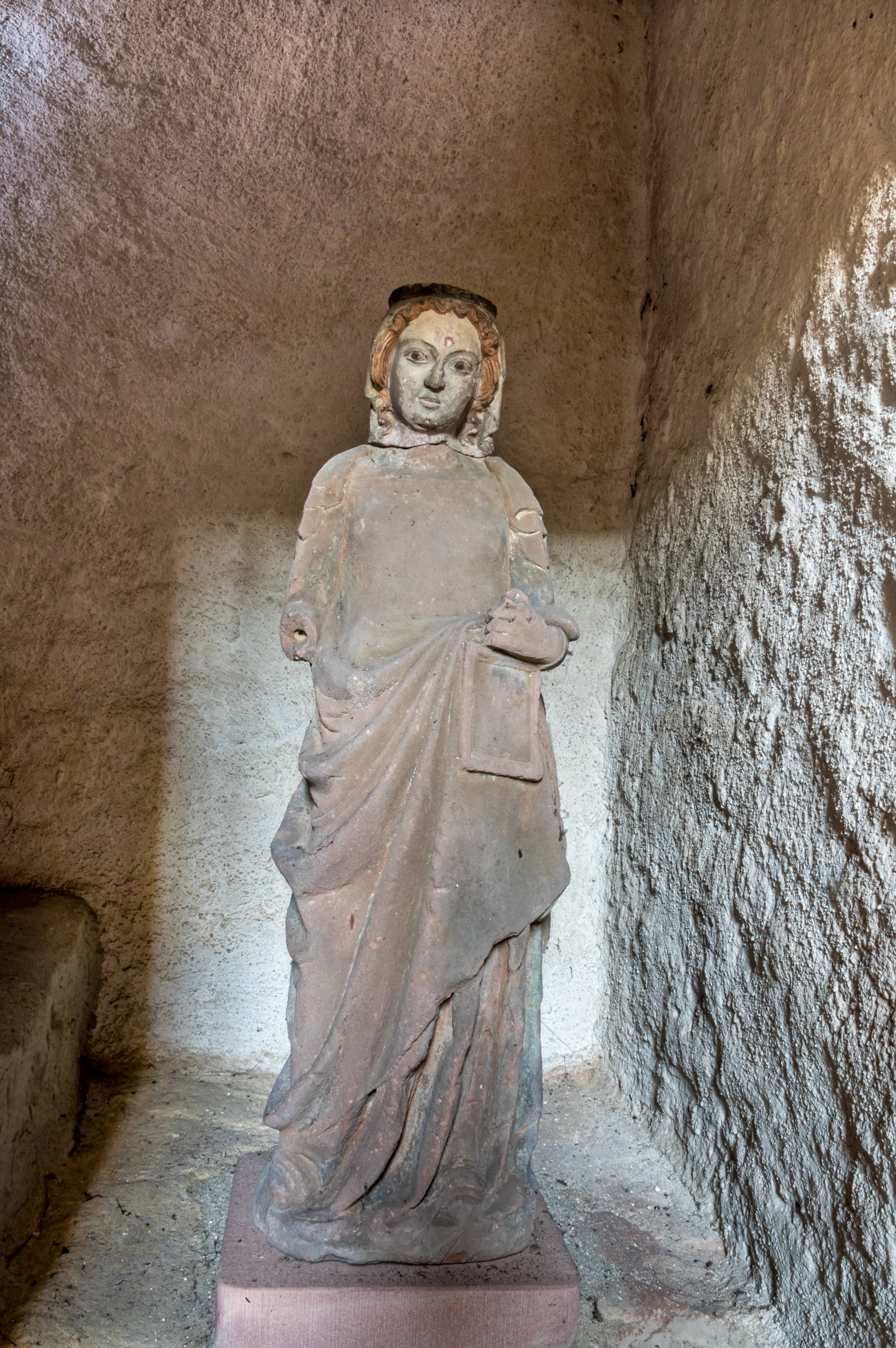 St. Agatha in Grunern, einem Teilort von Staufen Romanische Steinfigur